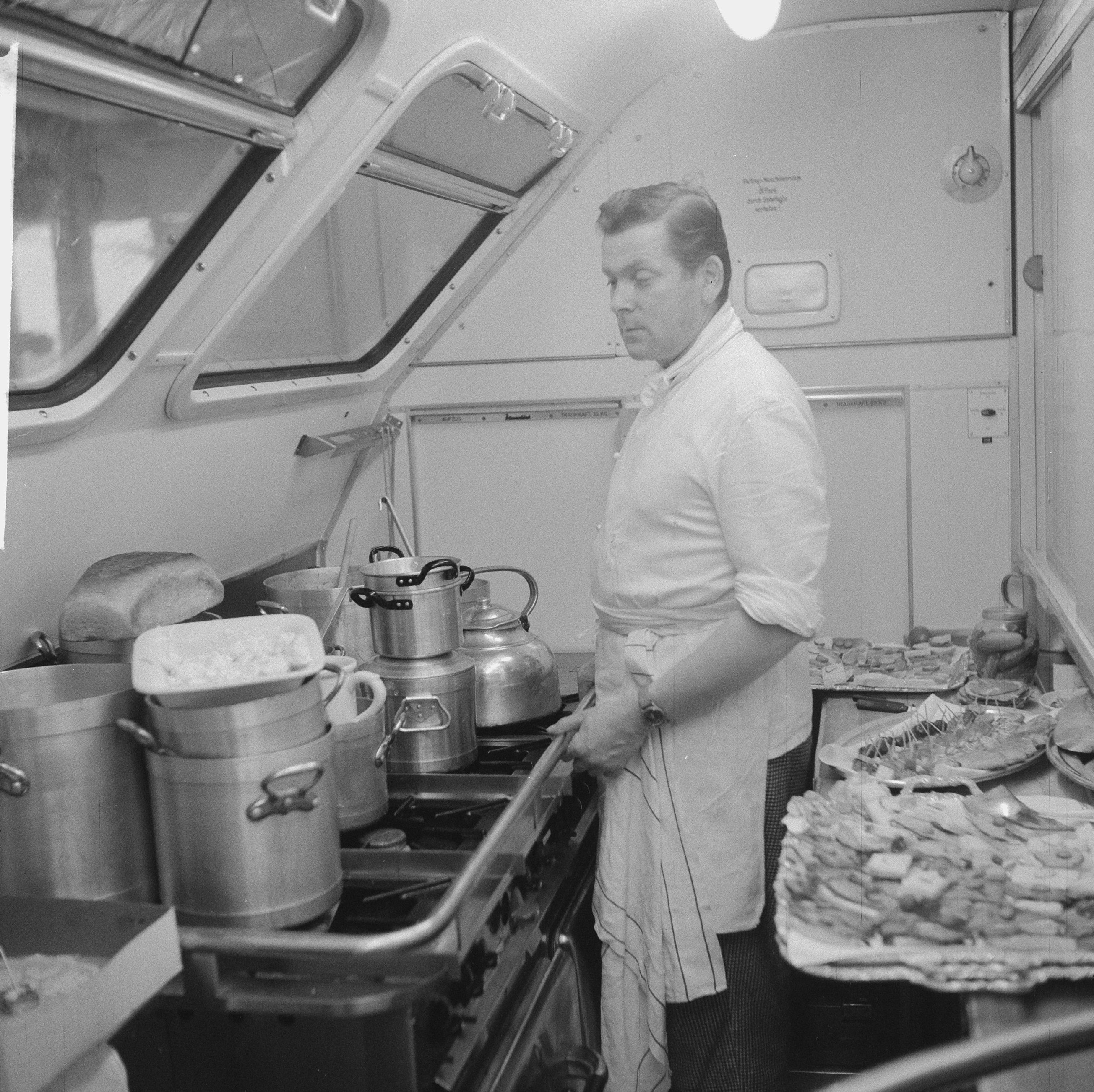 Collectie / Archief : Fotocollectie Anefo Reportage / Serie : [ onbekend ] Beschrijving : Rheingold interieur Duitse trein Datum : 25 mei 1962 Trefwoorden : interieurs, keukens, treinen Instellingsnaam : Rheingold Fotograaf : Nijs, Jac. de / Anefo Auteursrechthebbende : Nationaal Archief Materiaalsoort : Negatief (zwart/wit) Nummer archiefinventaris : bekijk toegang 2.24.01.03 Bestanddeelnummer : 913-9607